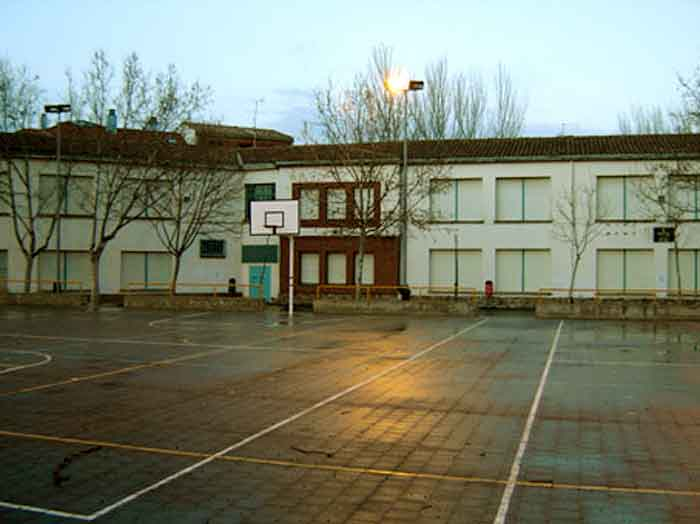 Antiguo Colegio Público Juan Yagüe y patio del mismo (2005)